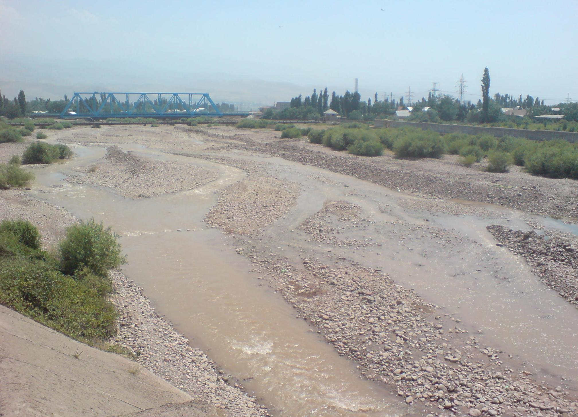 Река Карабау в городе Ангрен.Oʻzbekcha/ўзбекча: Qorabov Soy Angren shahrida